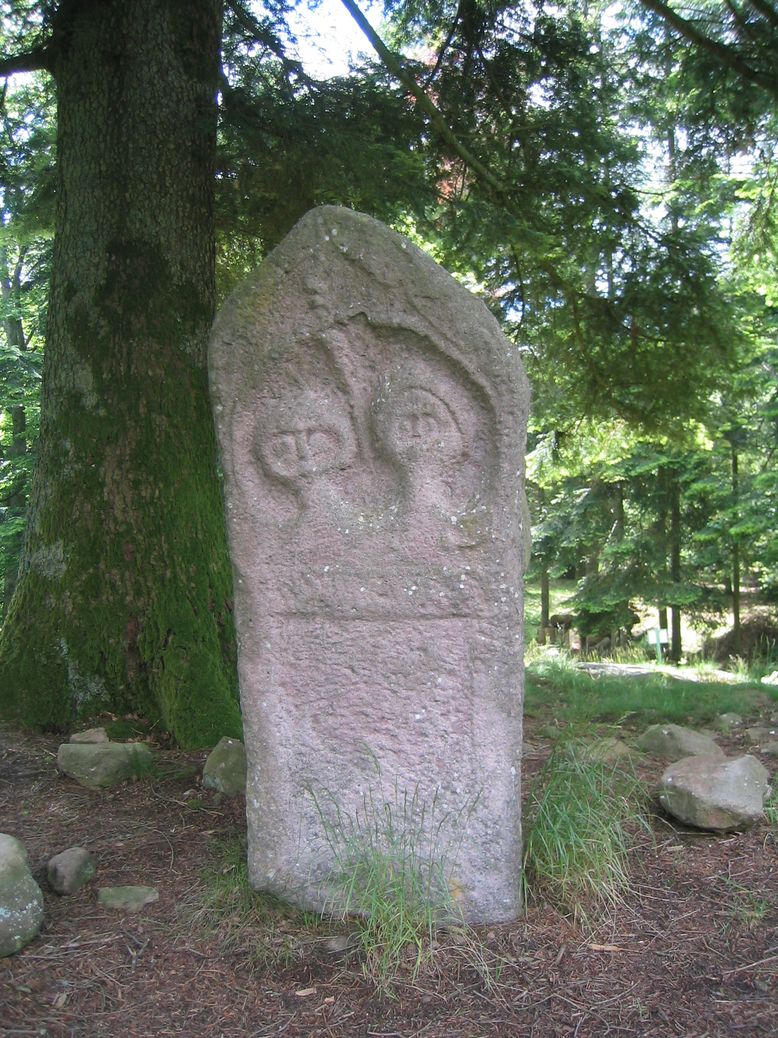 Stèle funéraire à deux personnages (Ier ou IIème s. après J.C.), au Camp celtique de la Bure (Saint-Dié-des-Vosges, Vosges, France). Il s'agit ici d'un moulage, l'original étant exposé au musée Pierre-Noël de Saint-Dié-des-Vosges.